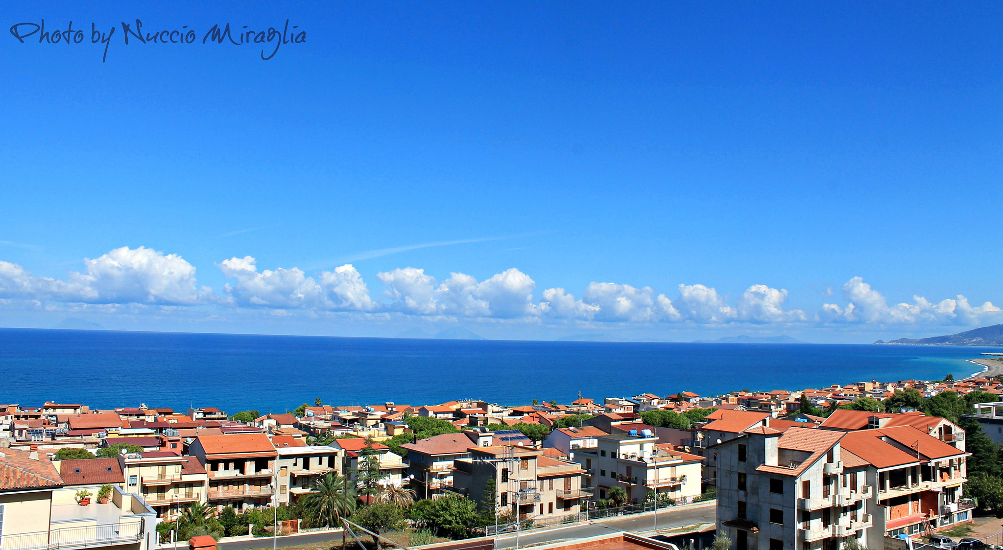 3 Ottobre